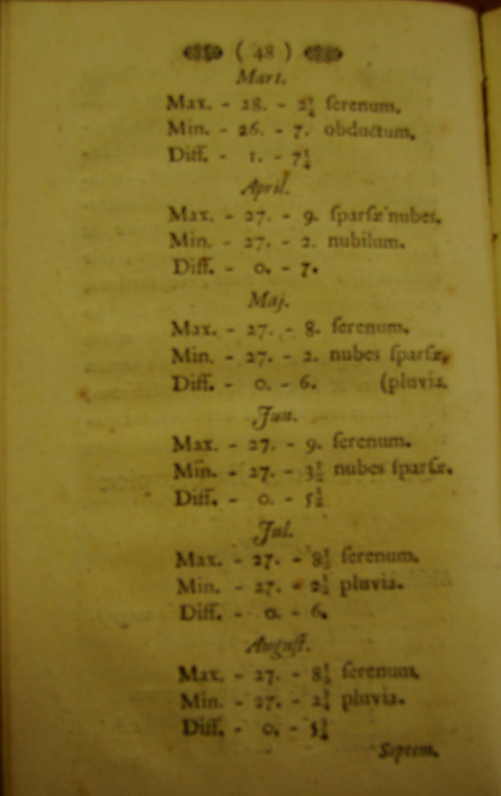 záznam Steplingových údajů